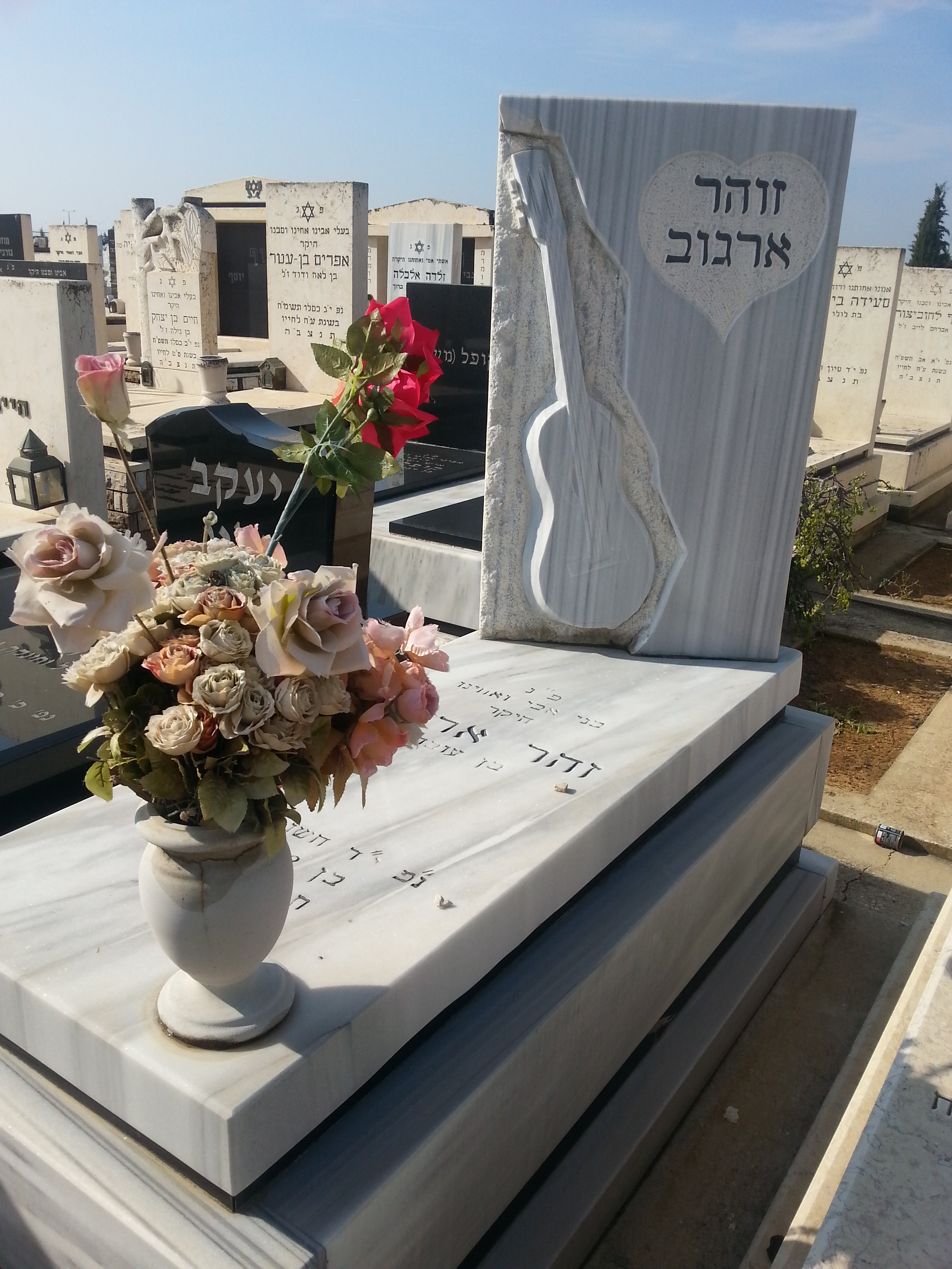 קברו של זוהר ארגוב - אזור ז'. חלקה 10. בית עלמין גורדון החדש. ראשון לציון.